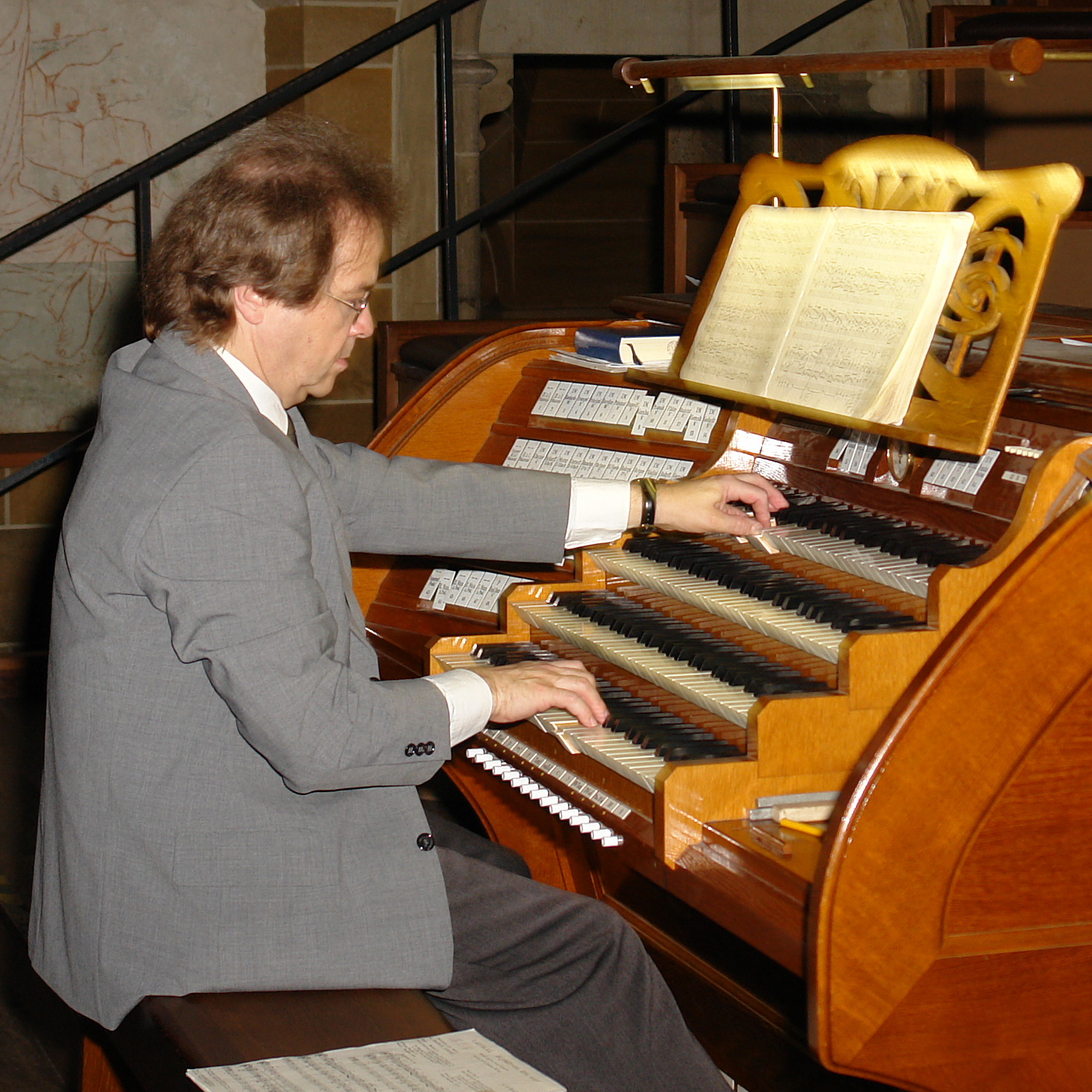 Prof. Wolfgang Baumgratz, Domorganist am Bremer St. Petri Dom (an der der Sauer-Orgel)